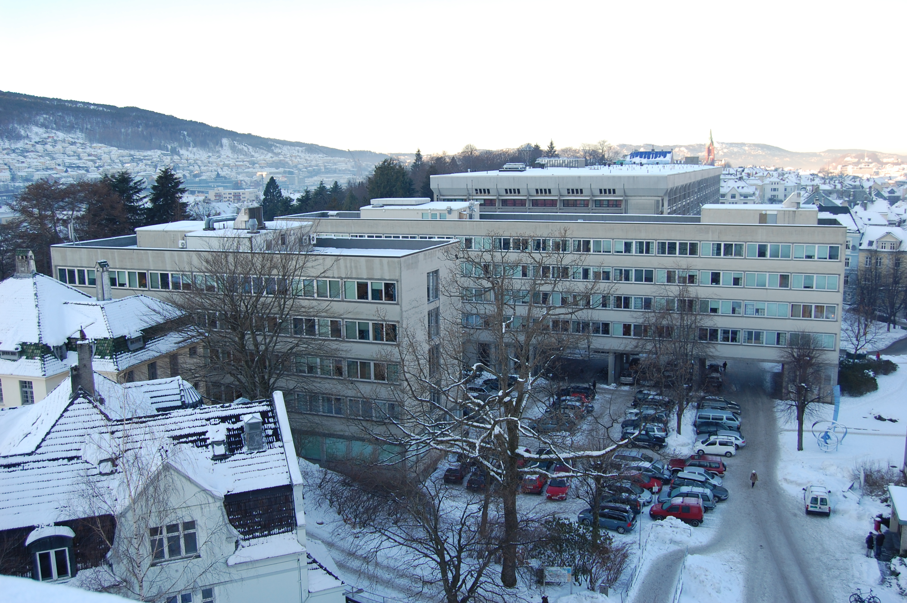 Bjørn Trumpys hus - Allégaten 55. Huser Bjerknessenteret (sydfløyen 4. og 5. etg.) og Institutt for fysikk og teknologi. Taket av Realfagbygget sees i bakgrunnen.